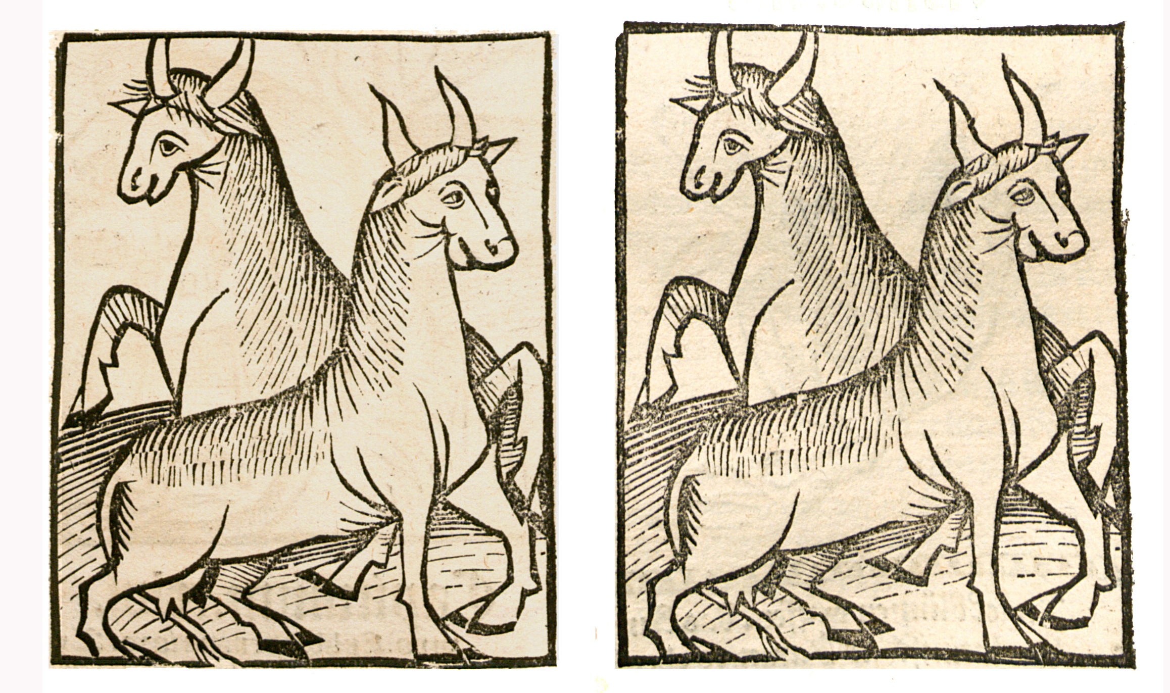 Abbildung von: Rinds Galle